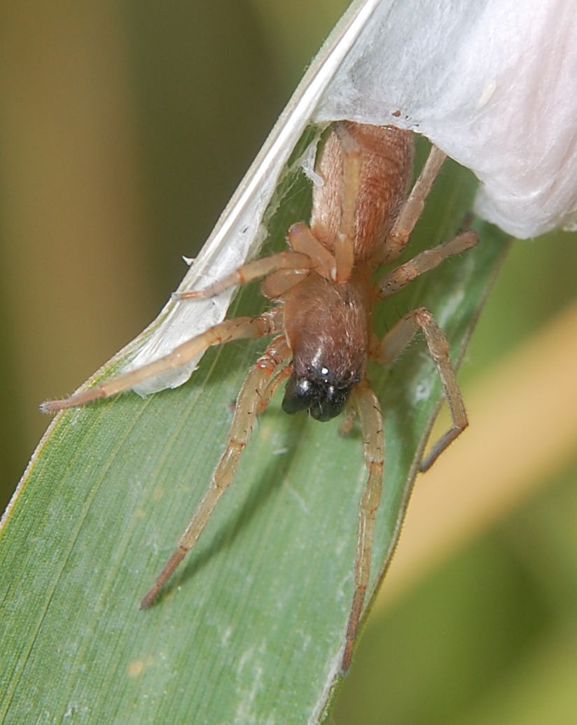 Clubiona stagnatilis, Weibchen. Tiefwerder, Berlin-Spandau. Det. genitalmorpholgisch durch K.-H. Kielhorn, Berlin